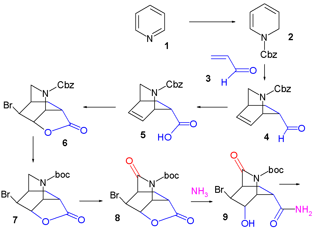 synthesis Oseltamivir Fukuyama Part I